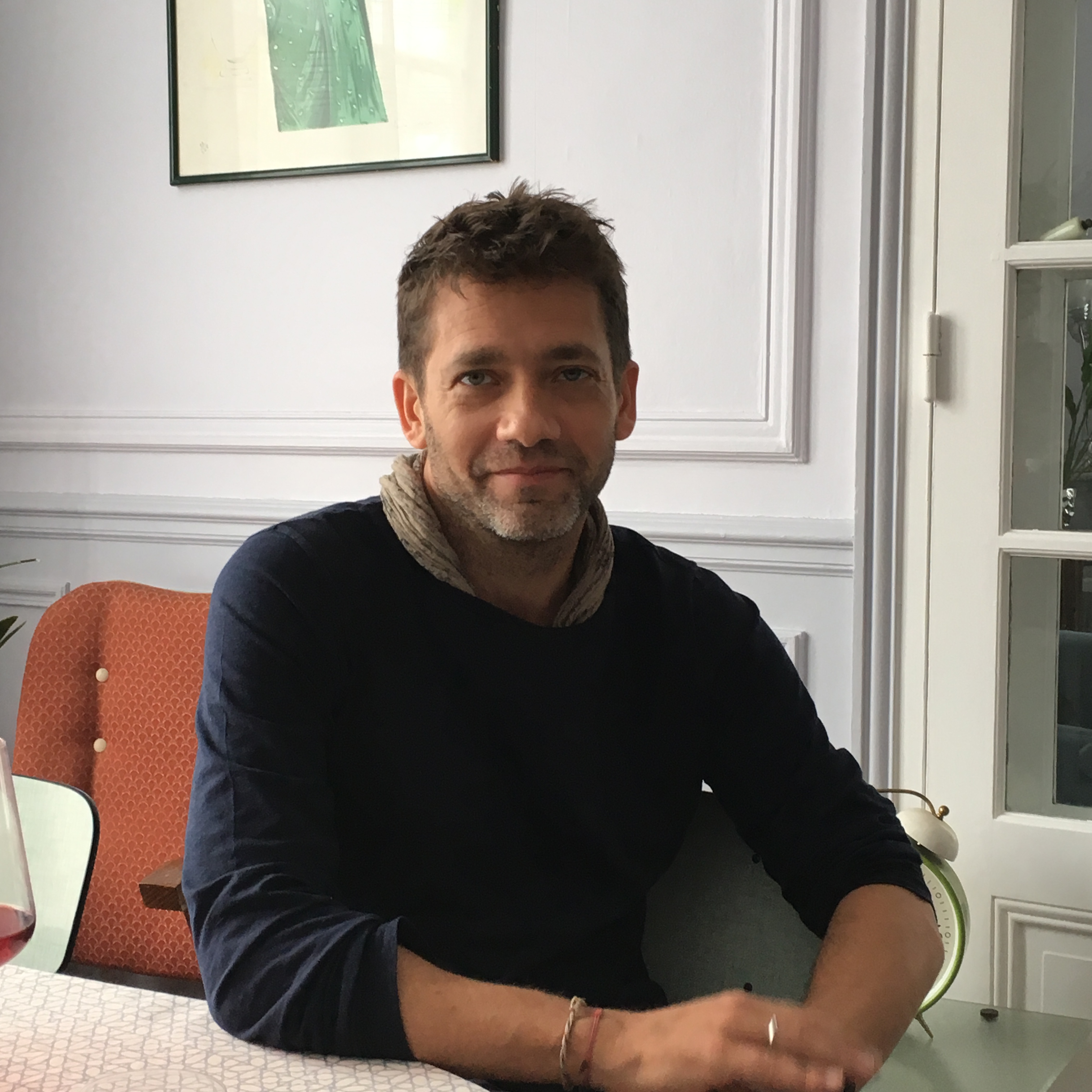 scénariste